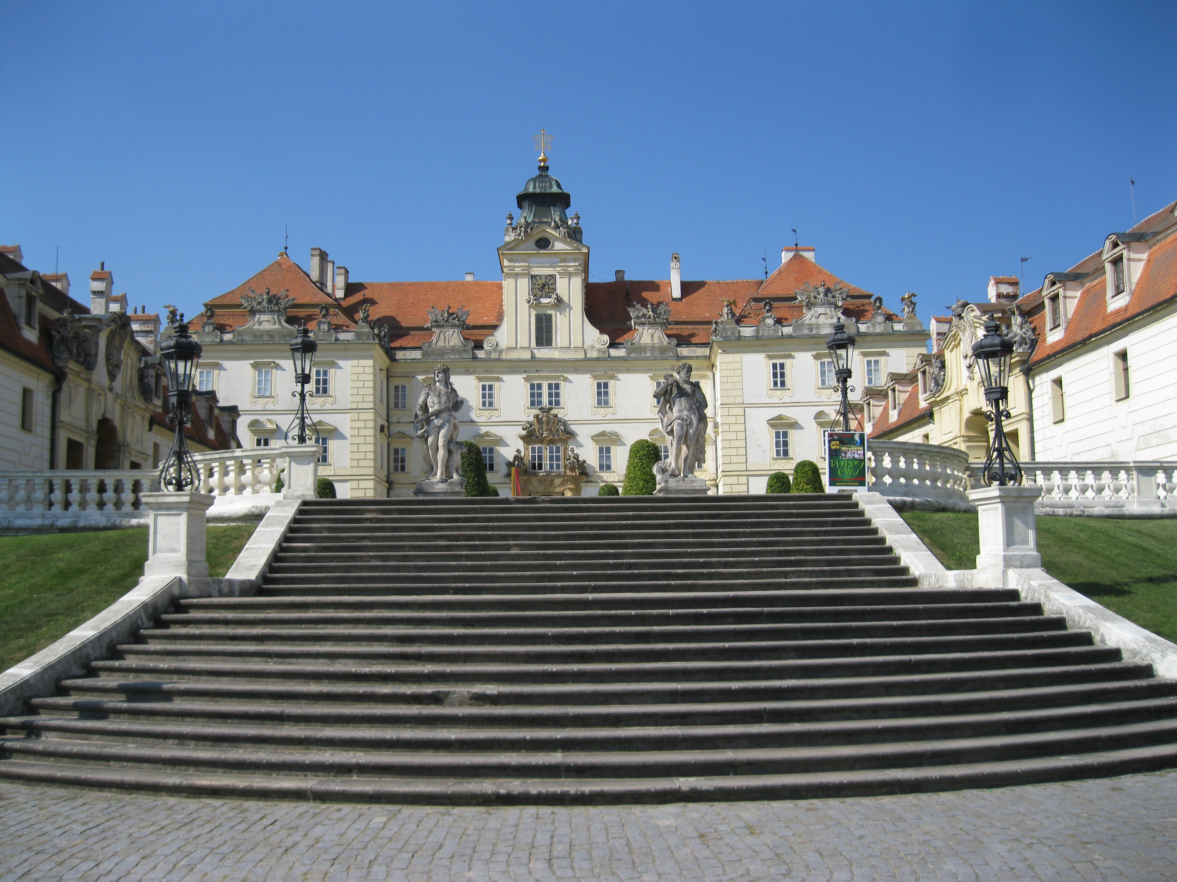 Zámek Valtice